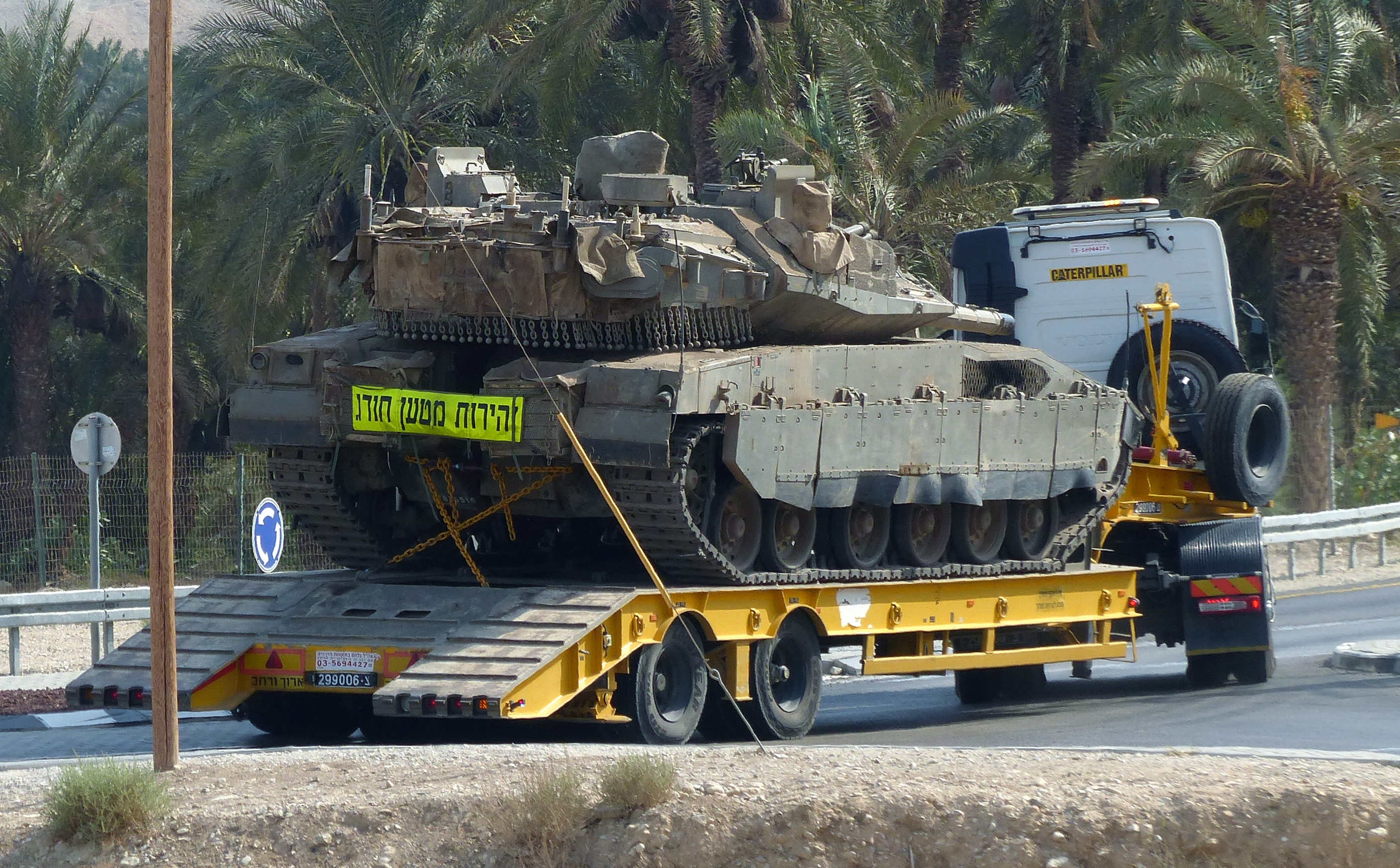 Carro de combate tipo Merkava, Israel